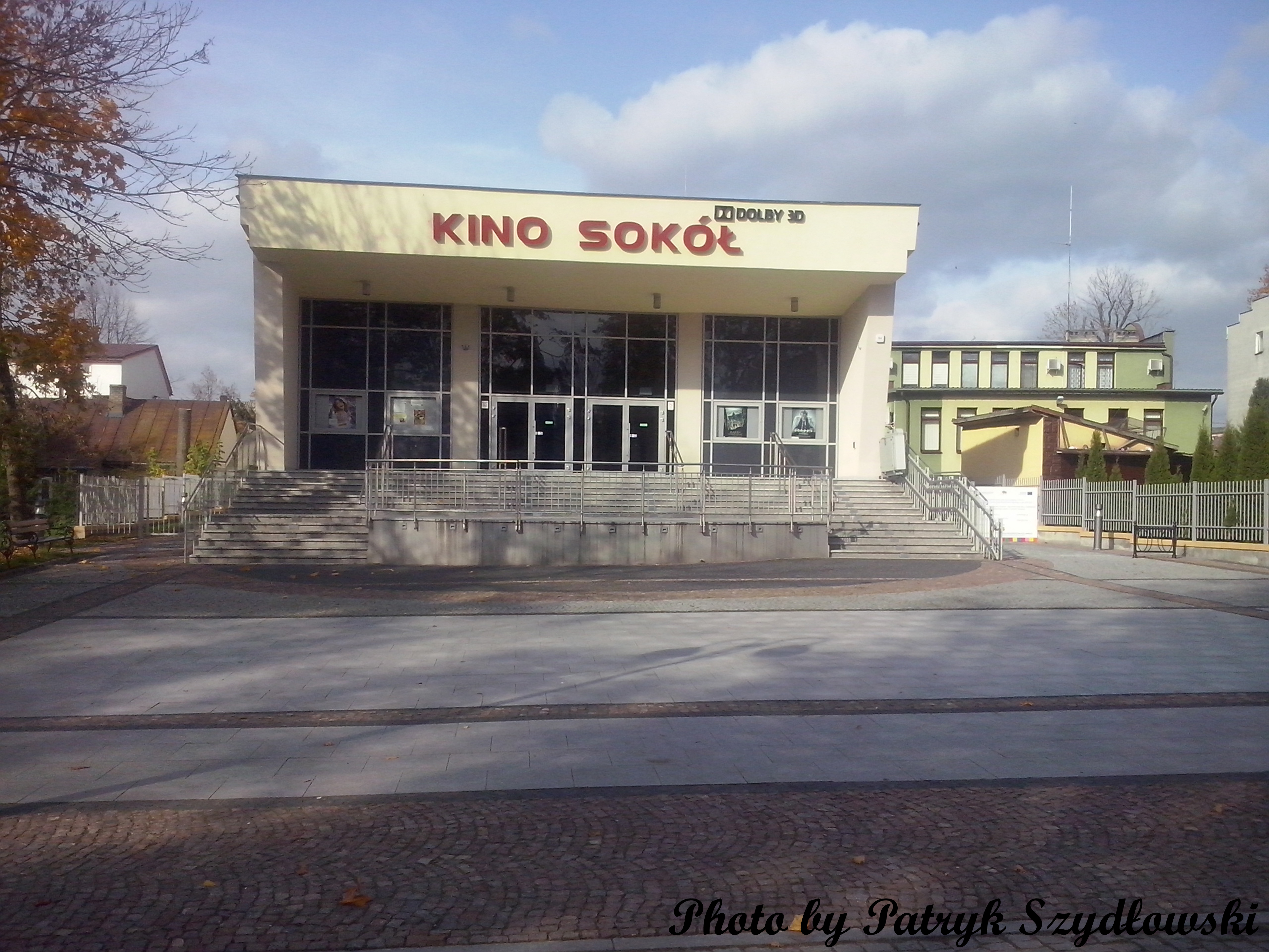 Kino "Sokół" w Sokółce 13.10.2014